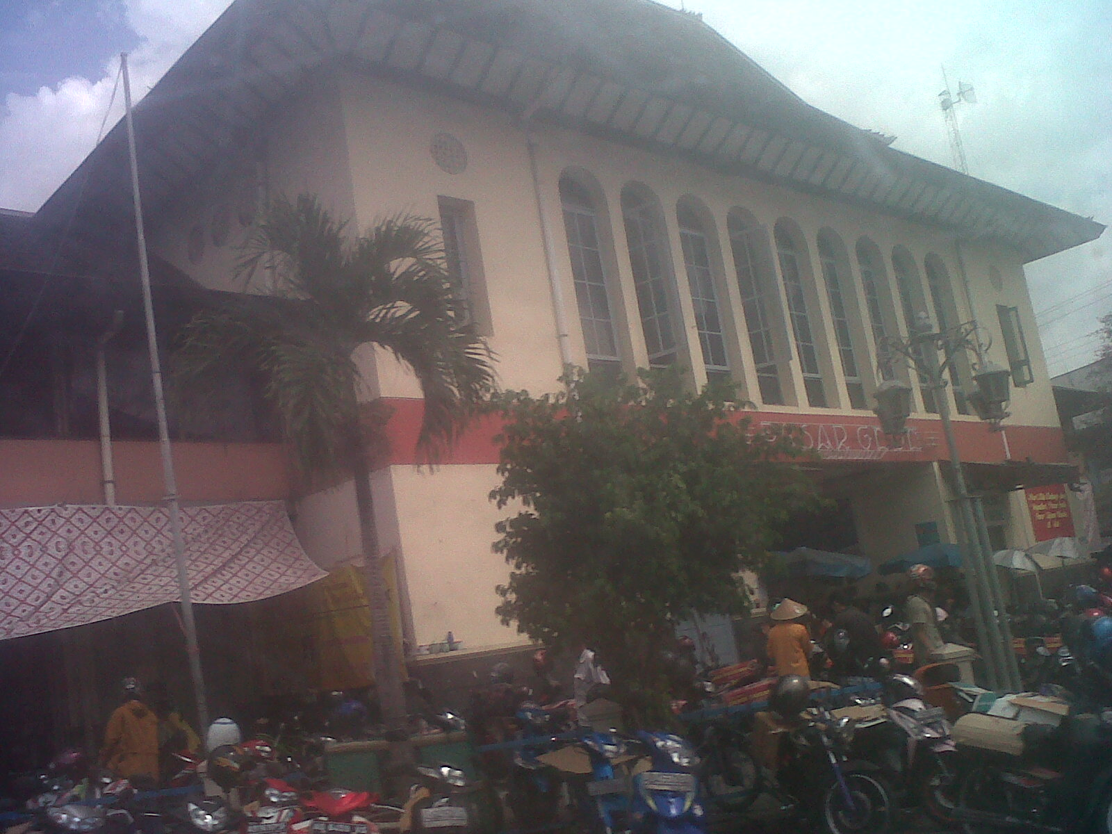 Pasar Gede Harjonagoro Surakarta Jawa Tengah Indonesia